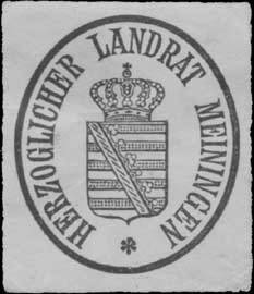 Sealing stamp Title: H. Landrat Meiningen Description: schwarz, weiß Place: Meiningen size: 4x3 cm